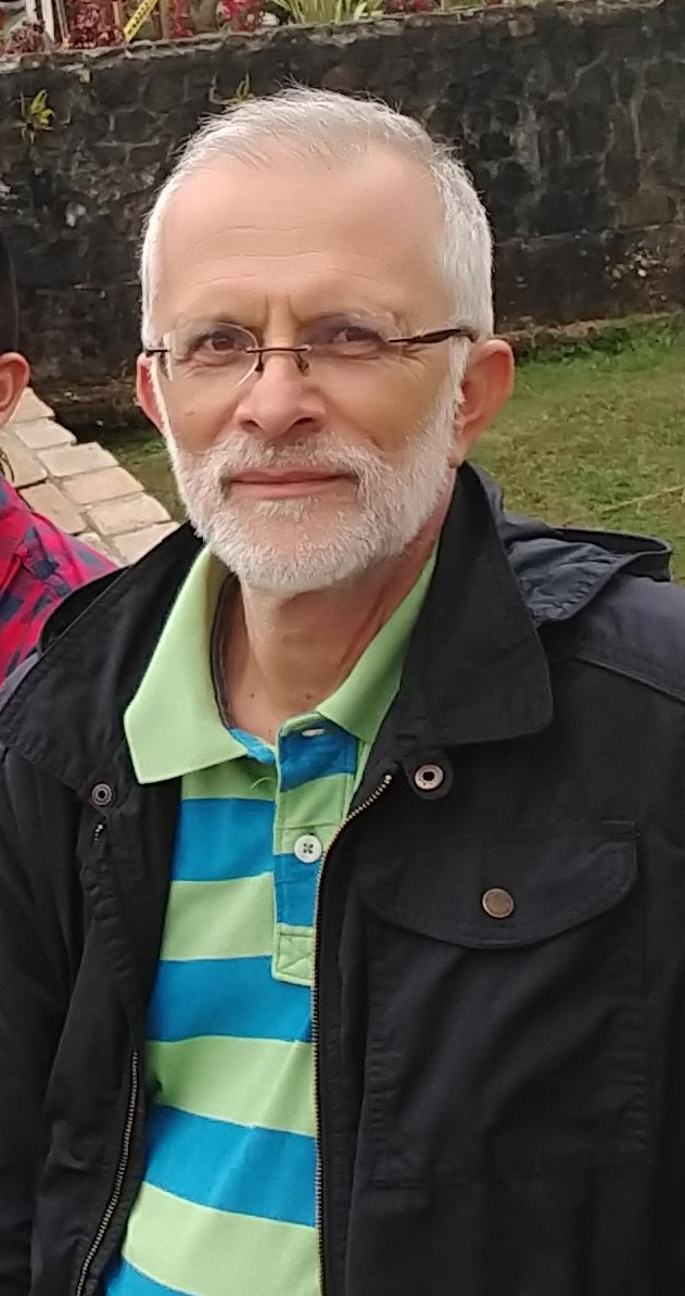 Profesor Oswaldo Lezama.